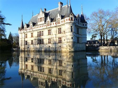 castle Azay le Rideau